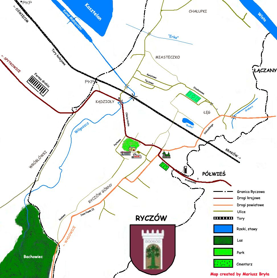 Poglądowa mapa Ryczowa